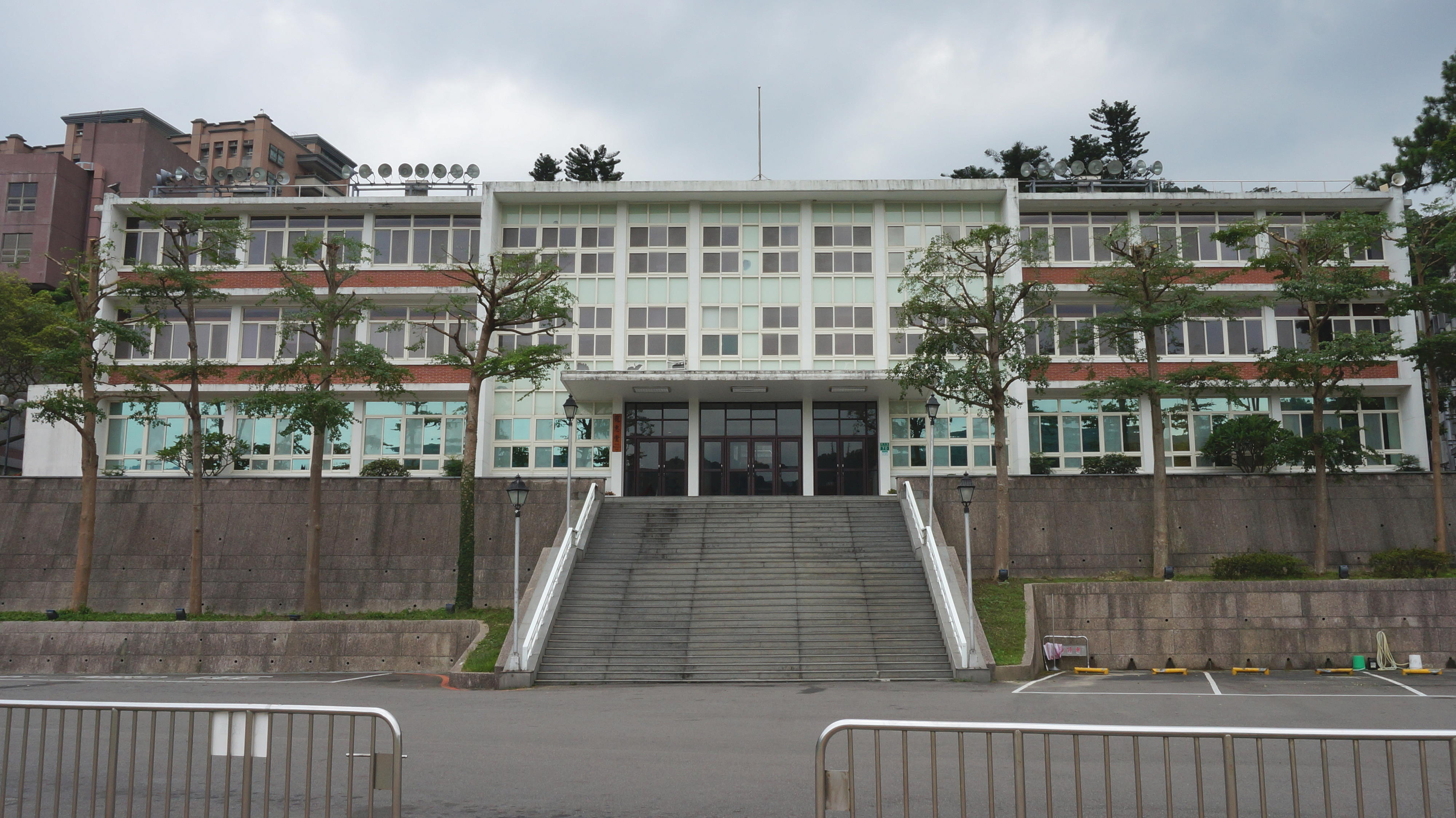 東吳大學外雙溪校區寵惠堂，因紀念王寵惠而得名。右前方是教職員專用交通車停車場。